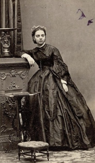 Вера Семёновна Анненкова, ур. Хлюстина (ум. 1904)